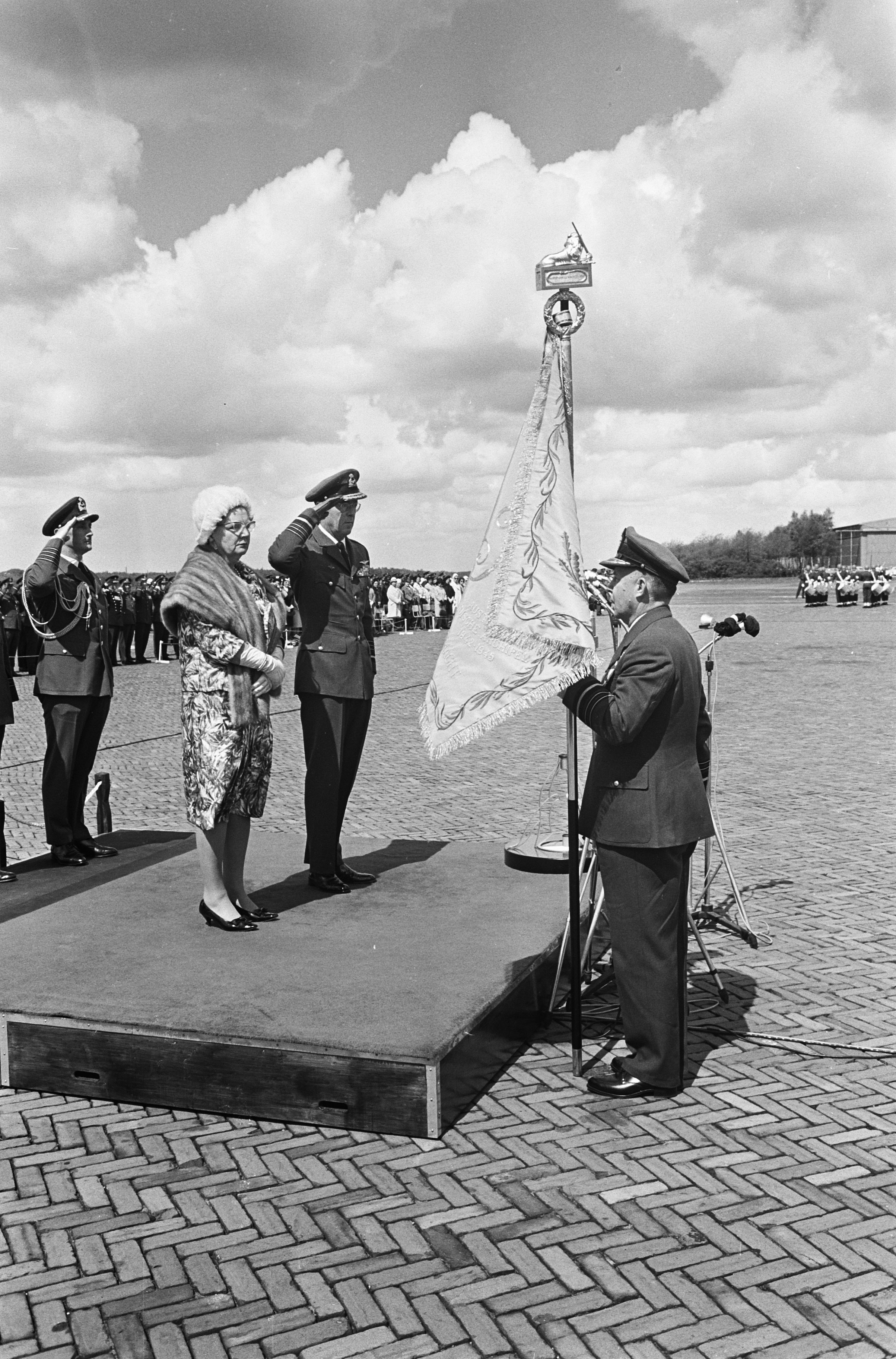 Collectie / Archief : Fotocollectie Anefo Reportage / Serie : [ onbekend ] Beschrijving : Koningin geeft vaandel aan Luchtmacht, overhandiging van vaandel Datum : 19 mei 1965 Trefwoorden : koninginnen, overhandigingen, vaandels Instellingsnaam : Koninklijke Luchtmacht Fotograaf : Koch, Eric / Anefo Auteursrechthebbende : Nationaal Archief Materiaalsoort : Negatief (zwart/wit) Nummer archiefinventaris : bekijk toegang 2.24.01.05 Bestanddeelnummer : 917-7922